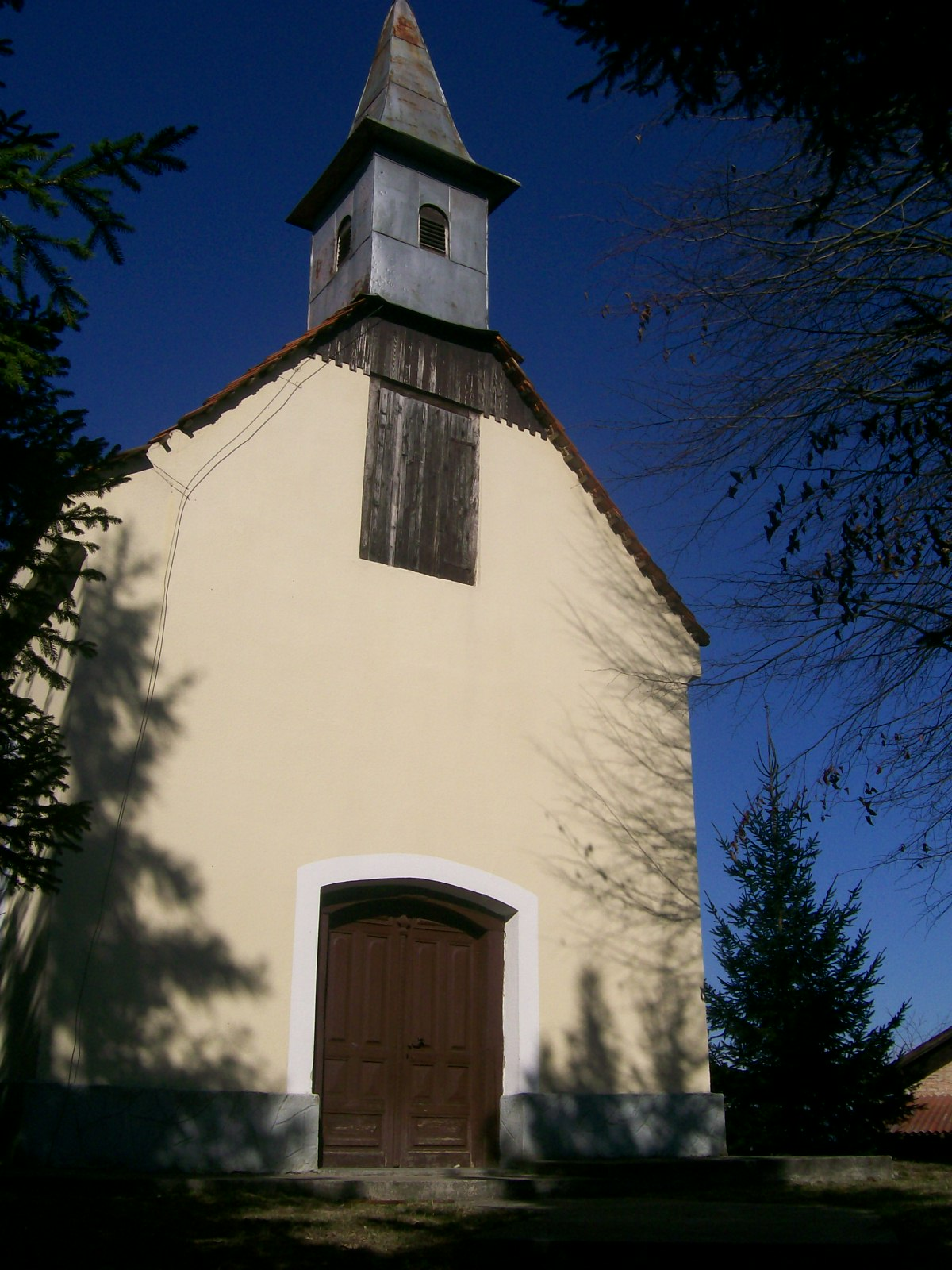 Kapelica Majke Božje u Celinama Goričkim, općina Marija Gorica, Zagrebačka županija